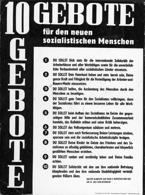 V. SED-Parteitag, Rede Ulbricht Zentralbild/Repro 30.7.1958 10 Gebote für den neuen sozialistischen Menschen. (Walter Ulbricht, 1. Sekretär des ZK der SED, auf dem V. Parteitag der SED am 10.7.1958 in Berlin) [Herausgegeben vom ZK der SED, Abteilung Agitation und Propaganda]